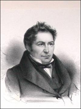 Pierre-Jean Denef